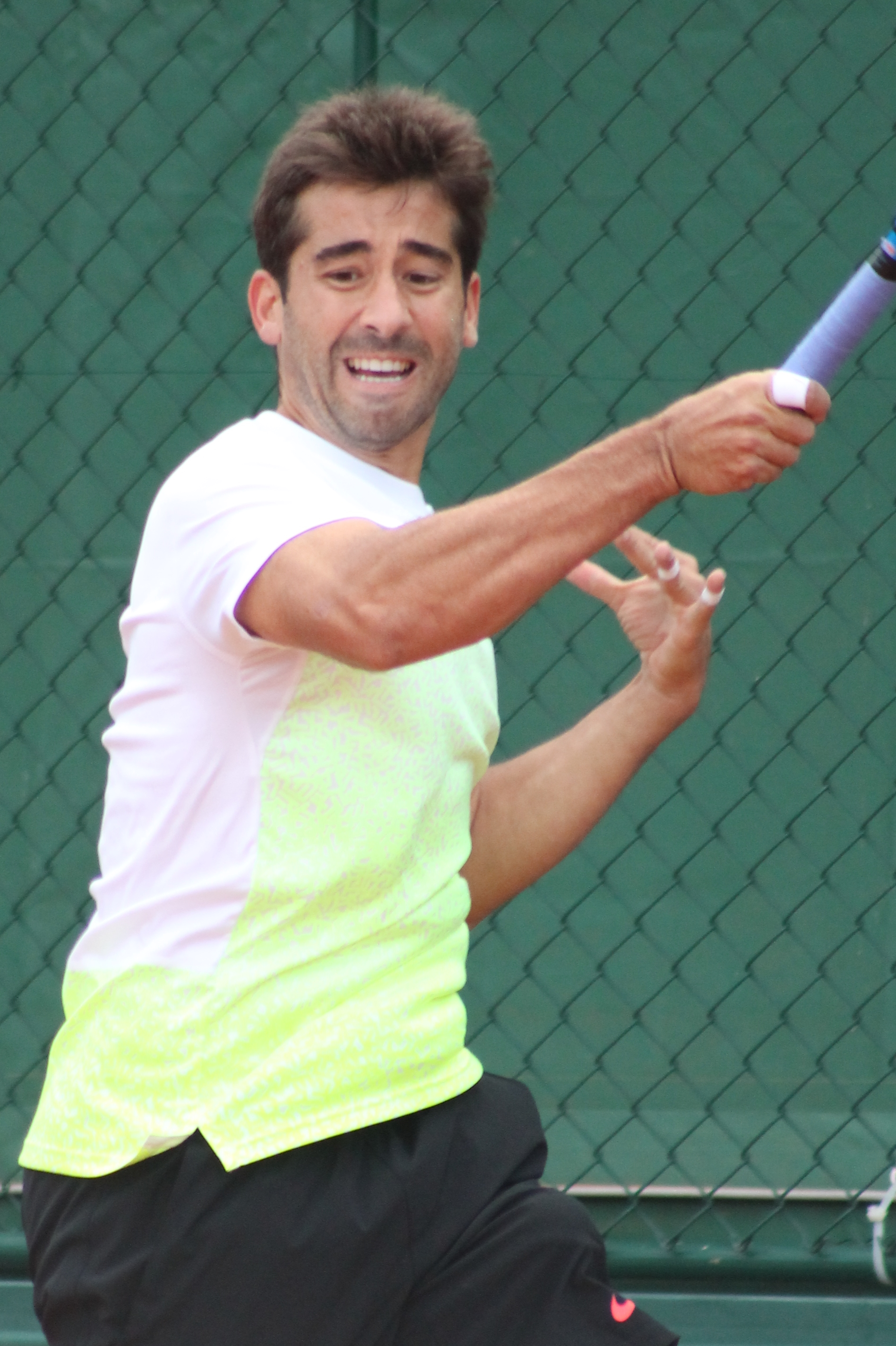 Lopez M. RG15 (10)